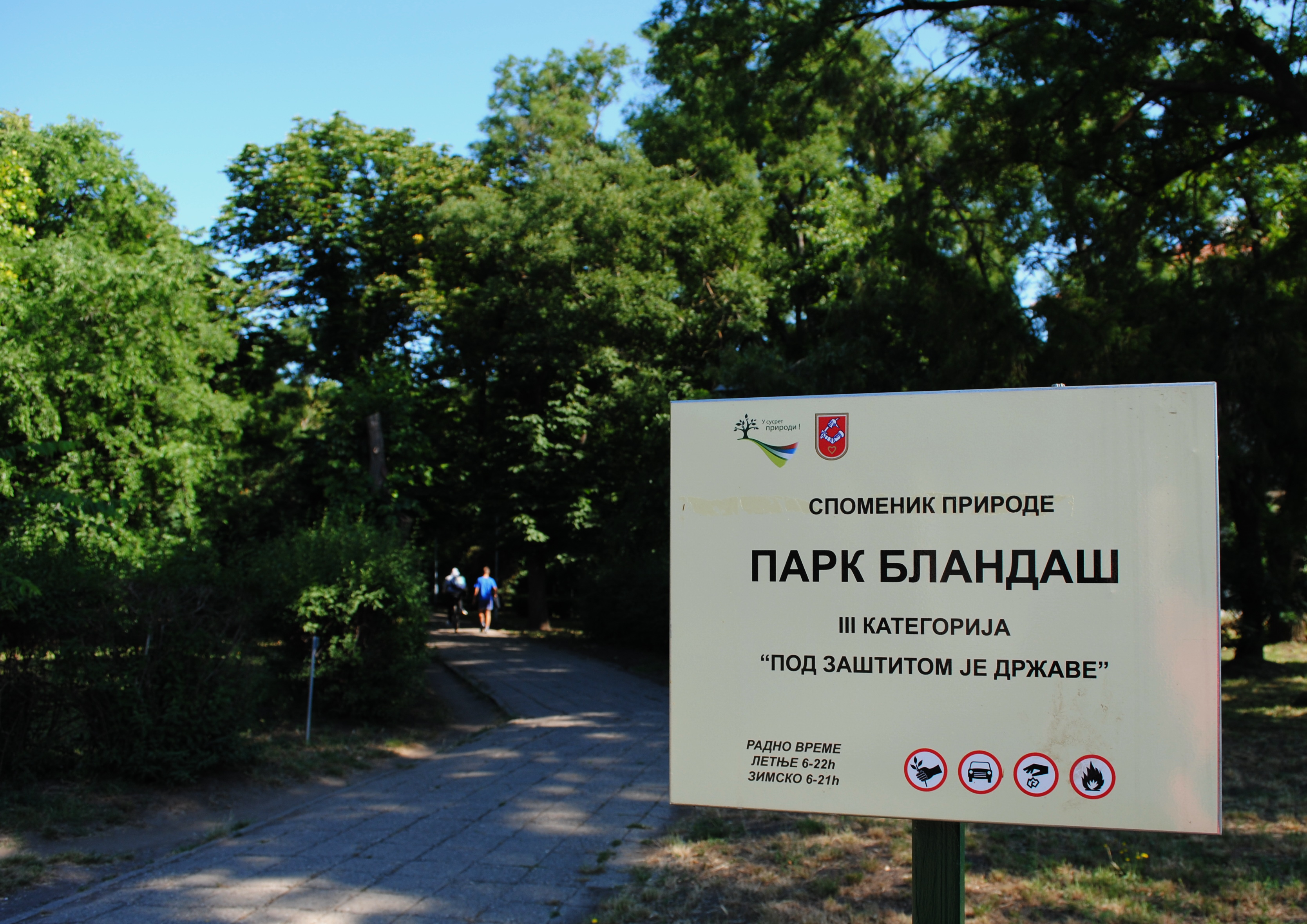 Srpski (latinica): Spomenik prirode Park Blandaš u Kikindi Ово је фотографија заштићеног природног добра у Србији под шифром: СП074This is a a photo of a natural area in Serbia with ID: СП074